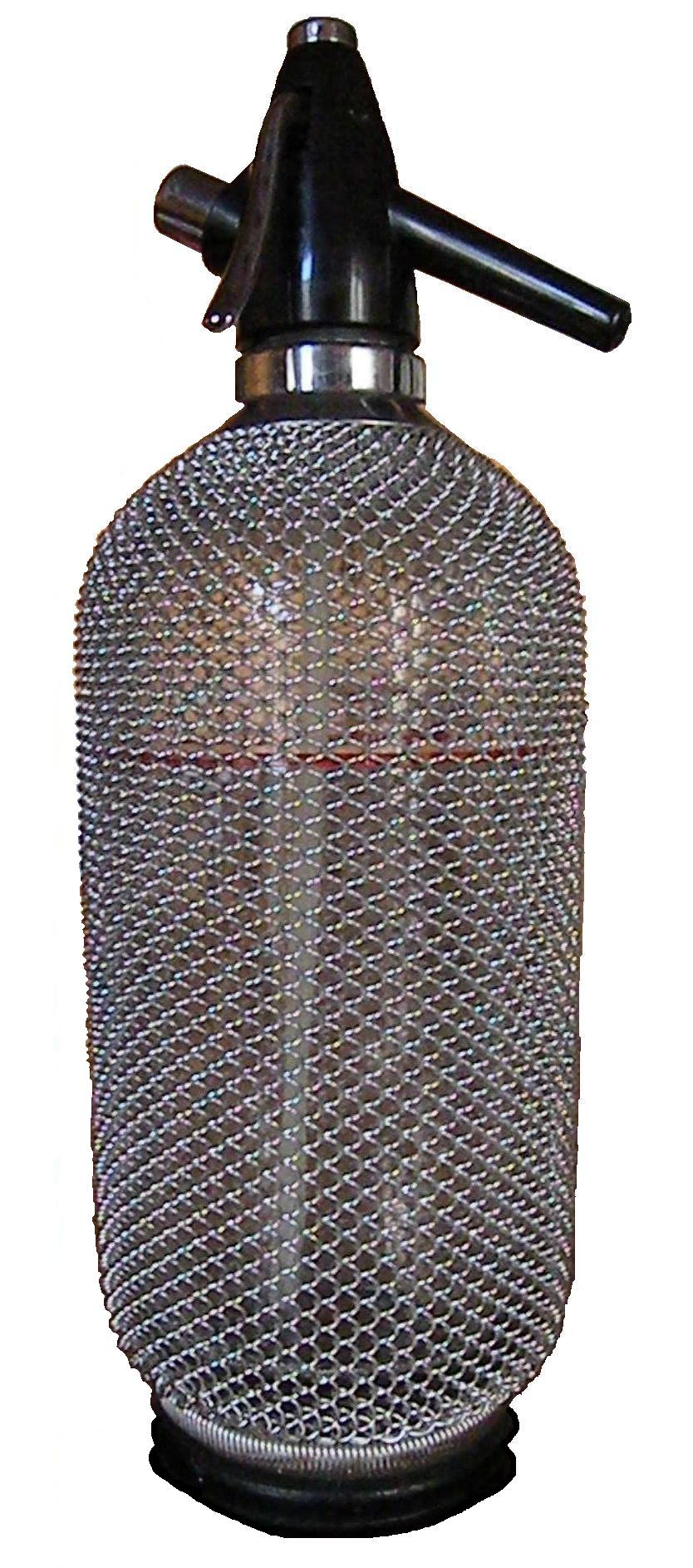 bouteille pour fabriquer de l'Eau de Seltz